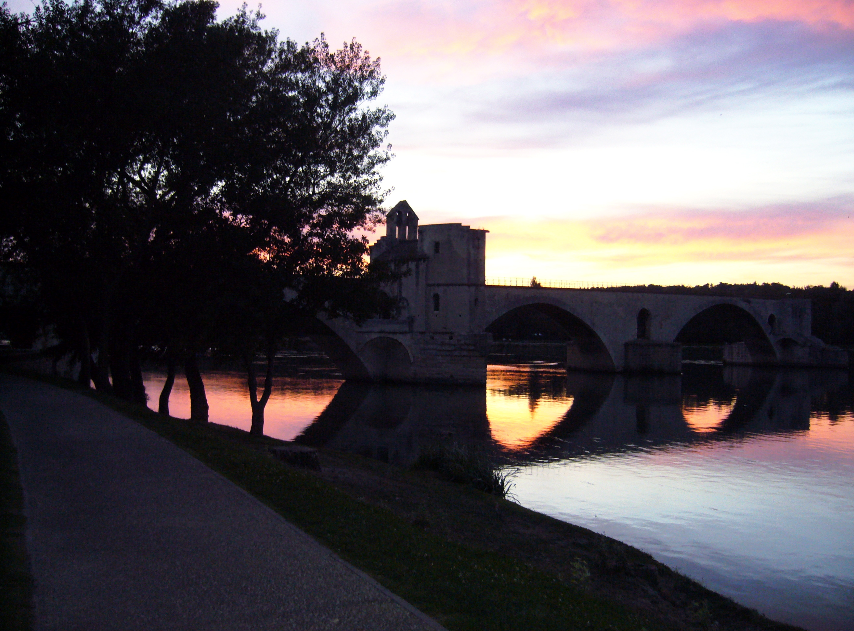 Vue de l’est au Pont Saint Bénezet en Avignon.